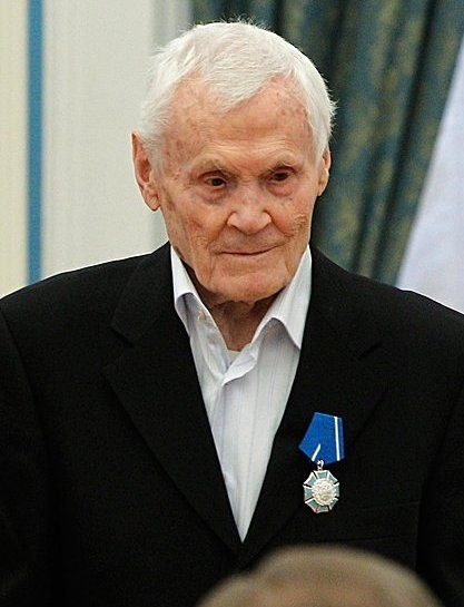 Photographer Wadim Gippenreiter Вручение государственных наград. Орденом Почёта награждён фотохудожник, член общероссийской общественной организации «Союз фотохудожников России» Вадим Гиппенрейтер.